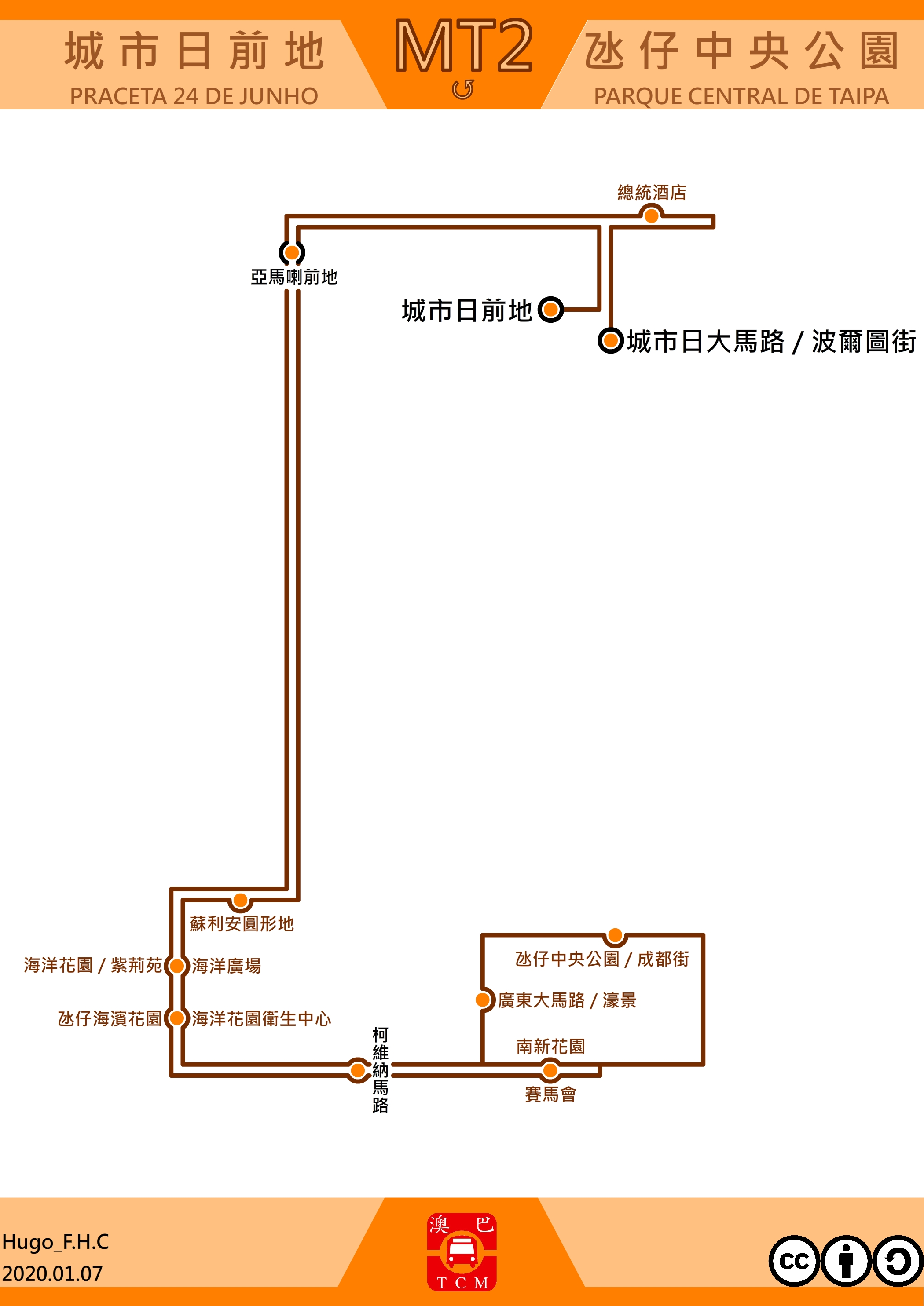 澳門巴士MT2走線圖